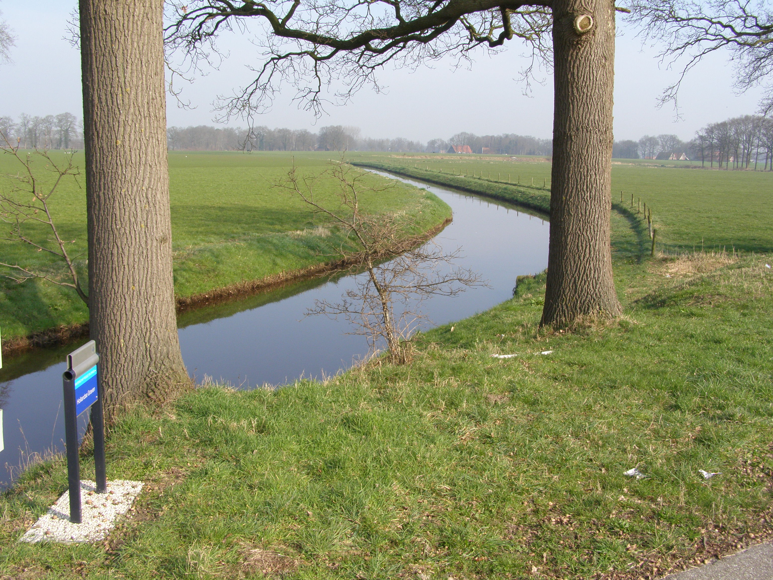 eigen werk